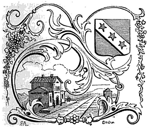 Gravure représentant la gare de Benfeld, sur le chemin de fer de Strasbourg à Bâle